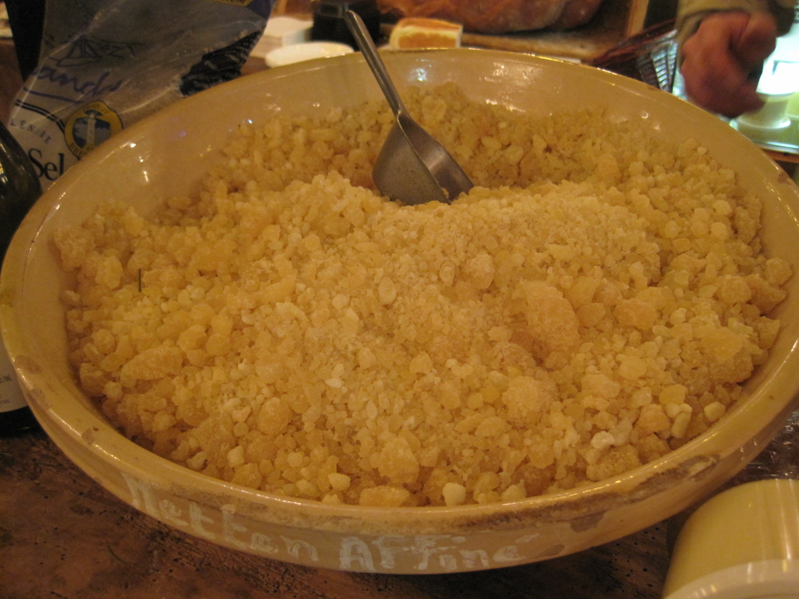 Marché de Noël de Montbéliard - Metton afiné de cancoillotte